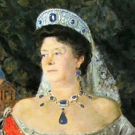 PORTRAIT OF GRAND DUCHESS MARIA PAVLOVNA THE ELDER